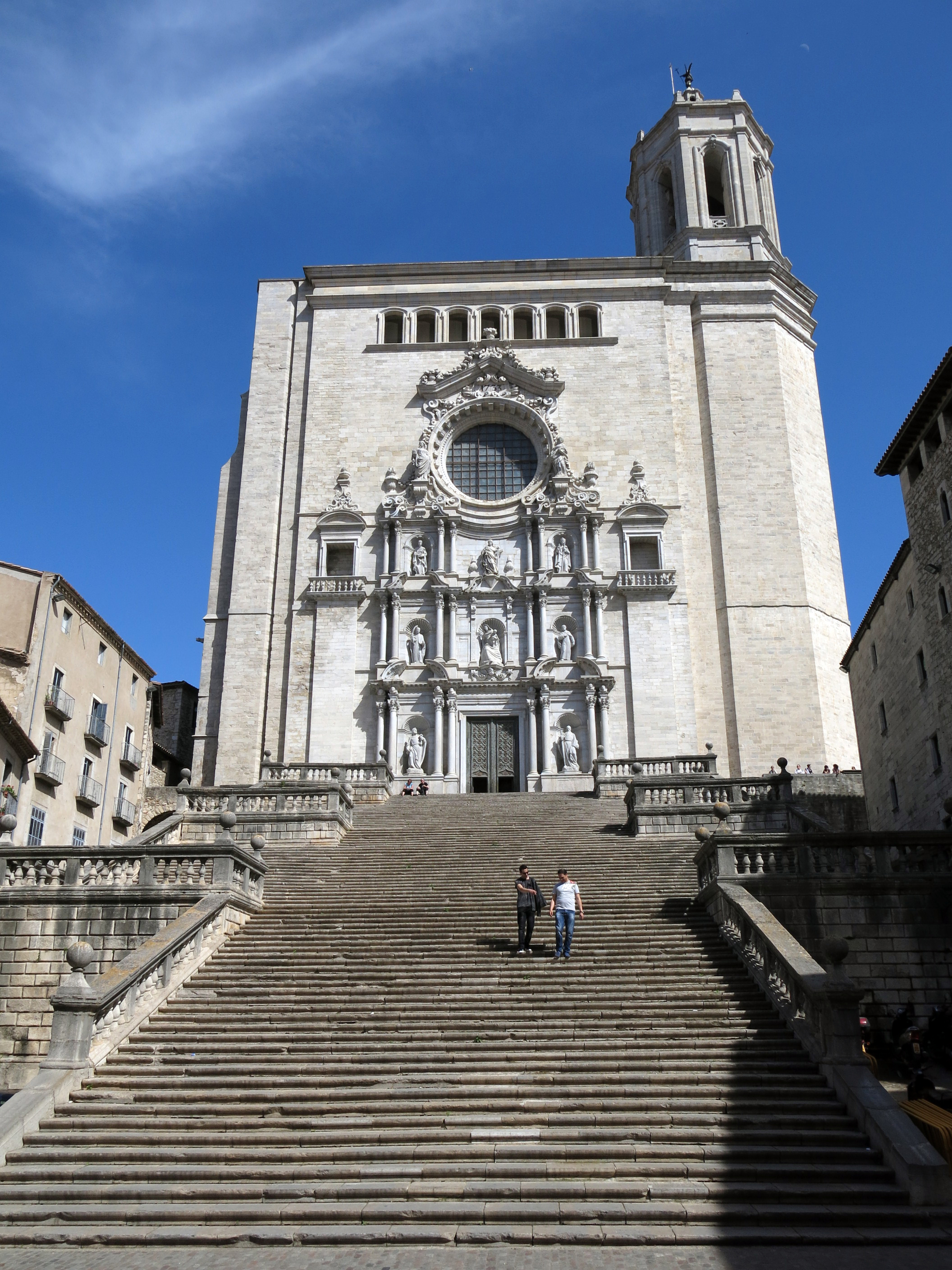 Catedral de Santa Maria (Girona)